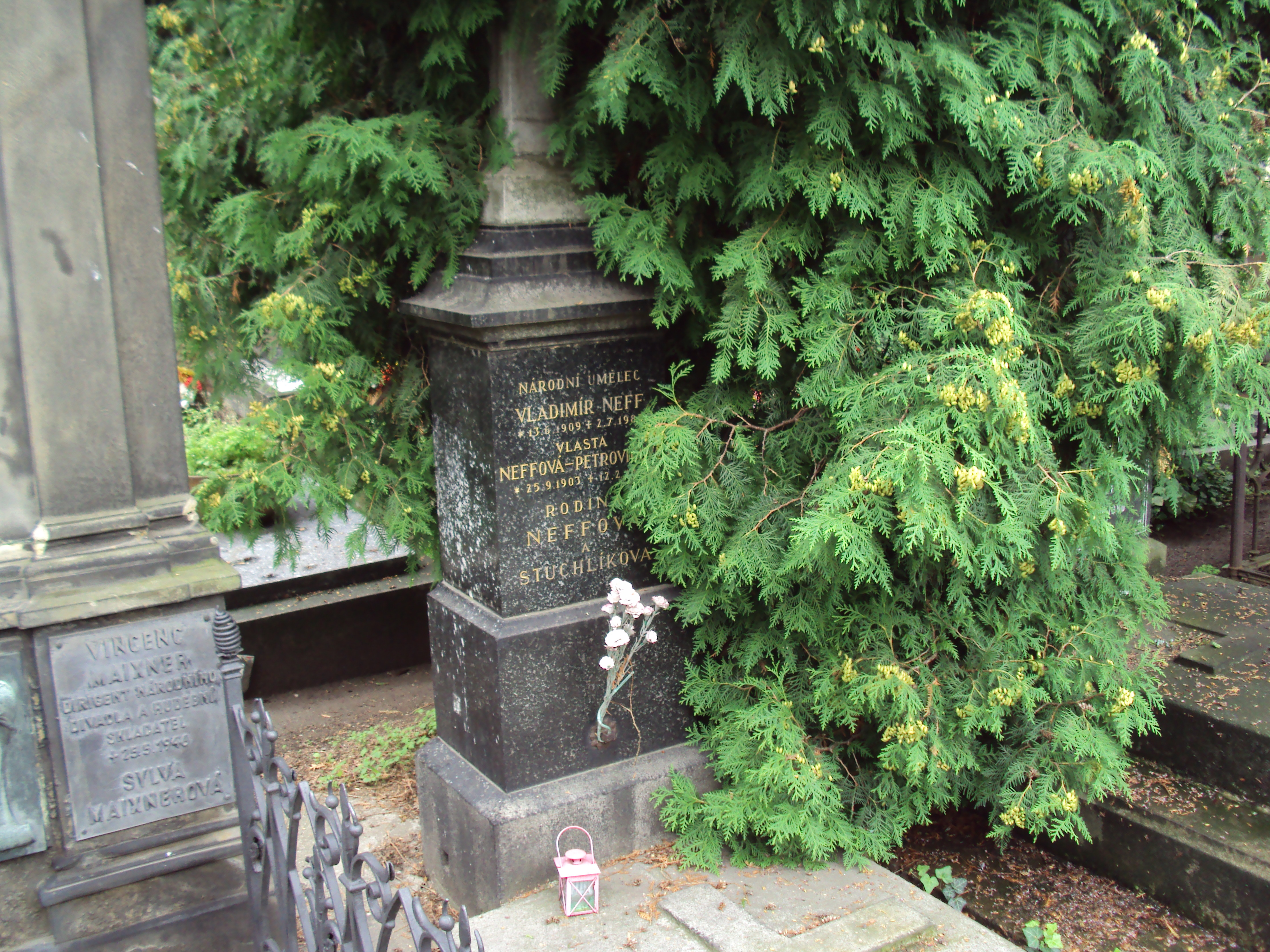 Hrob spisovatele na Vyšehradském hřbitově